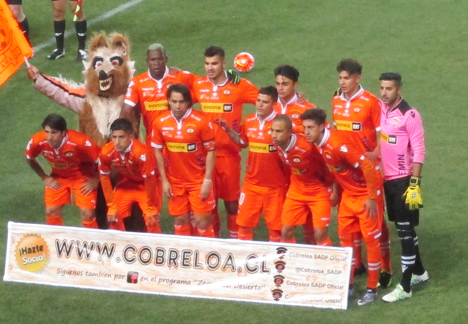 Club de Deportes Cobreloa en 2016